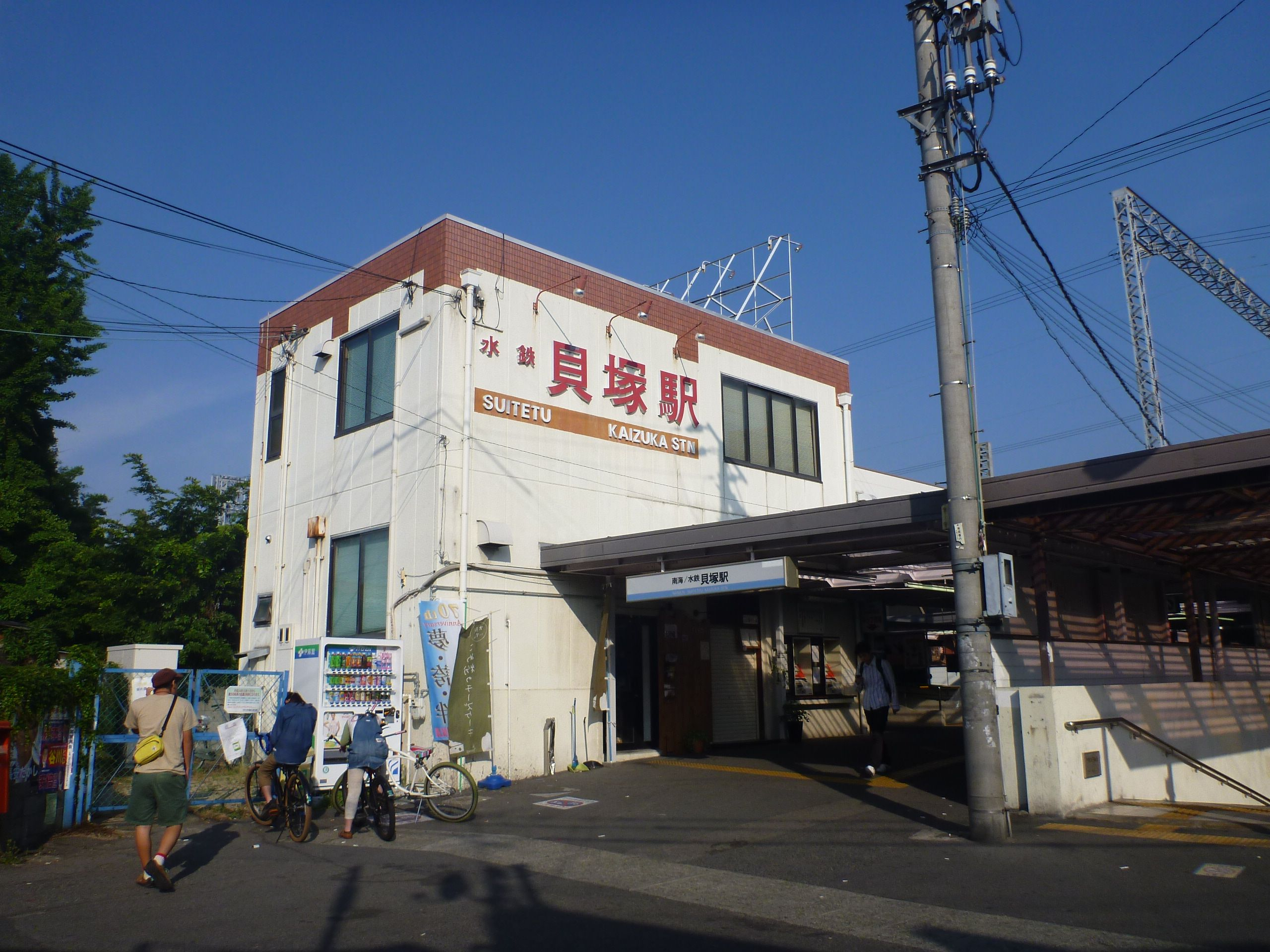 Kaizuka Station, Mizuma Railway